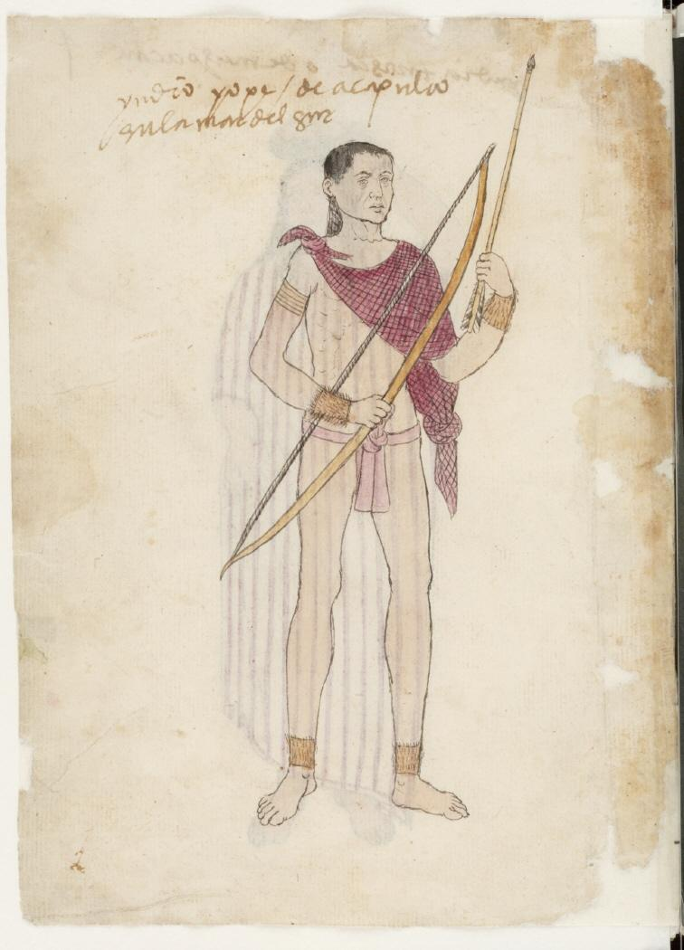 "indio Yope de Acapulco, en el mar del sur"